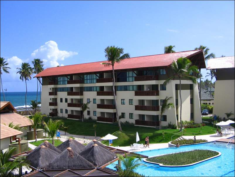 Resort Marulhos, Muro Alto, Pernambuco.